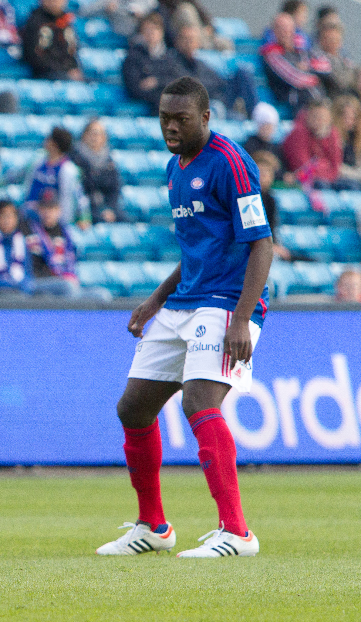 Fra Vålerengas kamp kamp mot Fredrikstad FK på Ullevaal stadion, 06.05.2012.